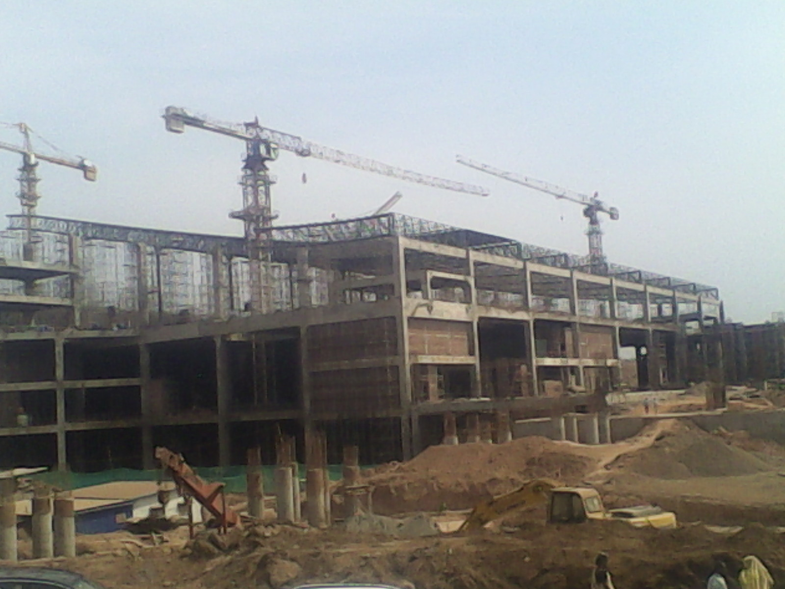 കണ്ണൂർ അന്താരാഷ്ട്ര വിമാനത്താവളത്തിലെ പണി പുരോഗമിച്ചു കൊണ്ടിരിക്കുന്ന ടെർമിനൽ കെട്ടിടം